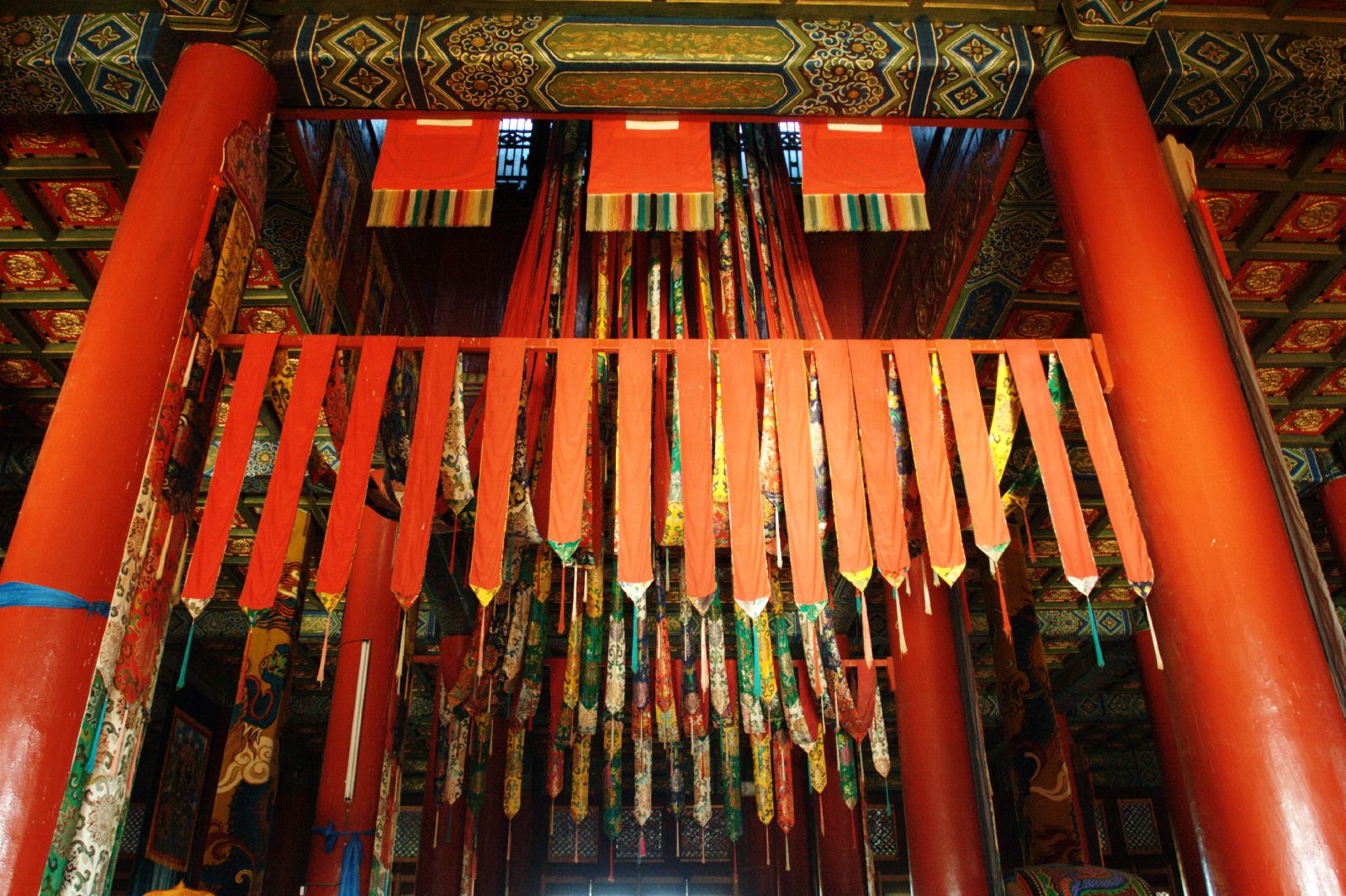 Amarbayasgalant Khiid